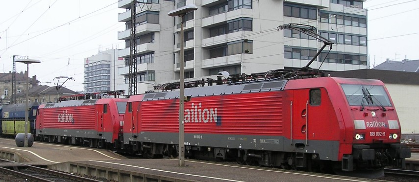 Doppeltraktion der Baureihe 189 002 und 189 075 vor einem Güterzug